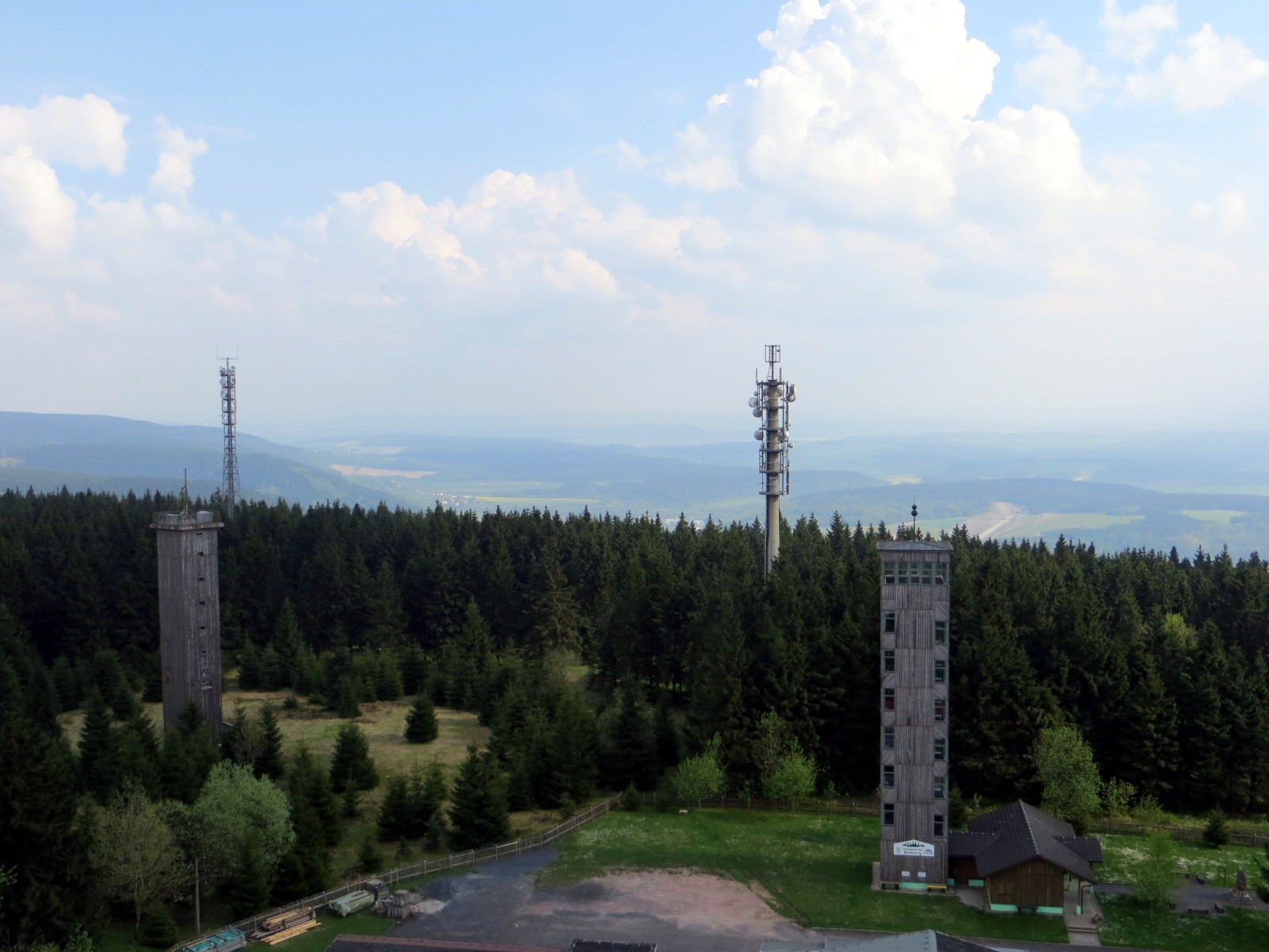 Sendemasten auf dem Bleßberg (Thüringen)